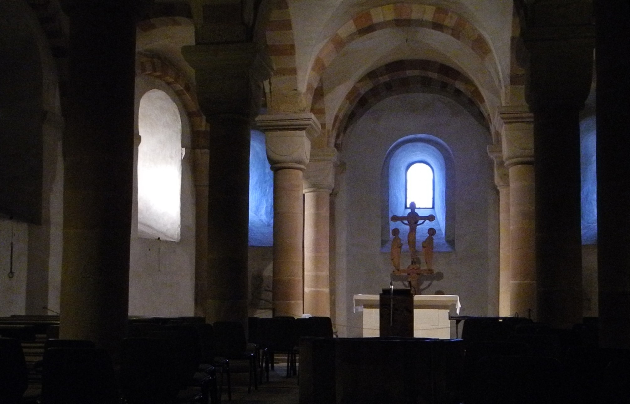 Speyer - Dom ab 1025, Krypta